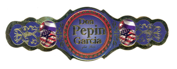 Don Pepin Garcia Blue Label band